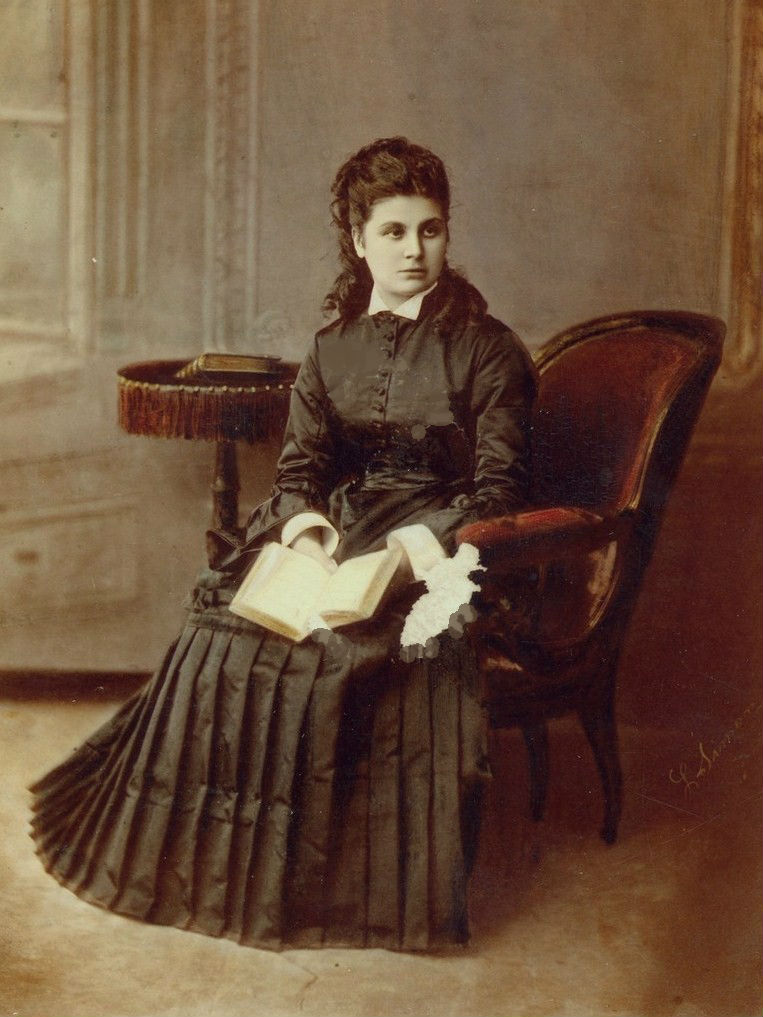 Елена Эрастовна Шервашидзе, ур. Андреевская (1846—1918)